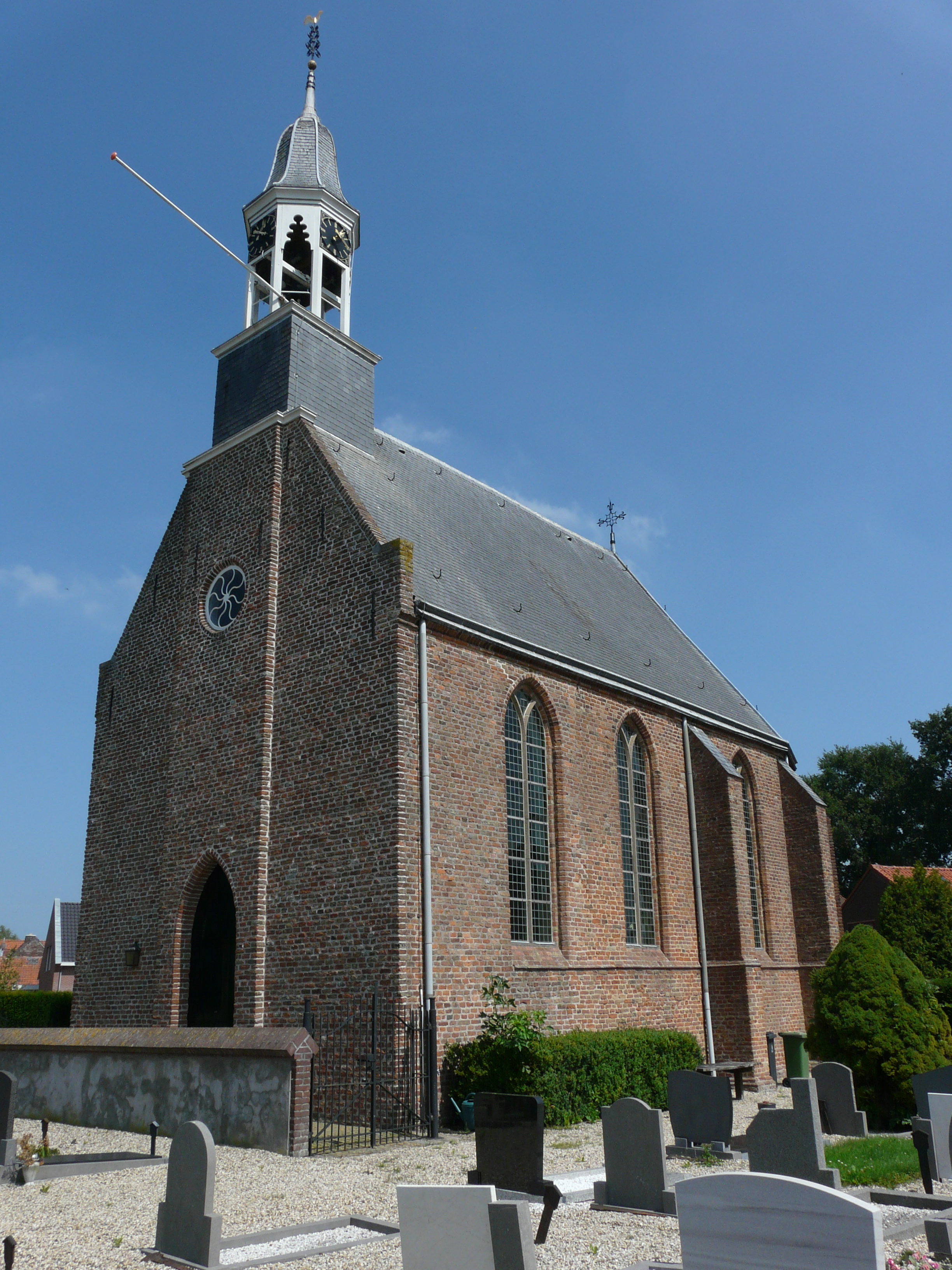 Zicht op een deel van de Hervormde kerk, Kerkstraat 7, 4121 EA Everdingen